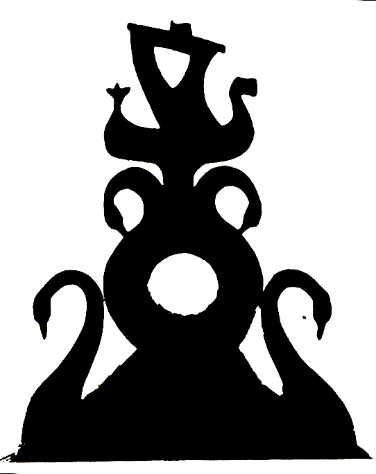 Giebelzeichen am "Blockhaus am Strom" des Malers und Grafikers Karl-Heinrich Kluge